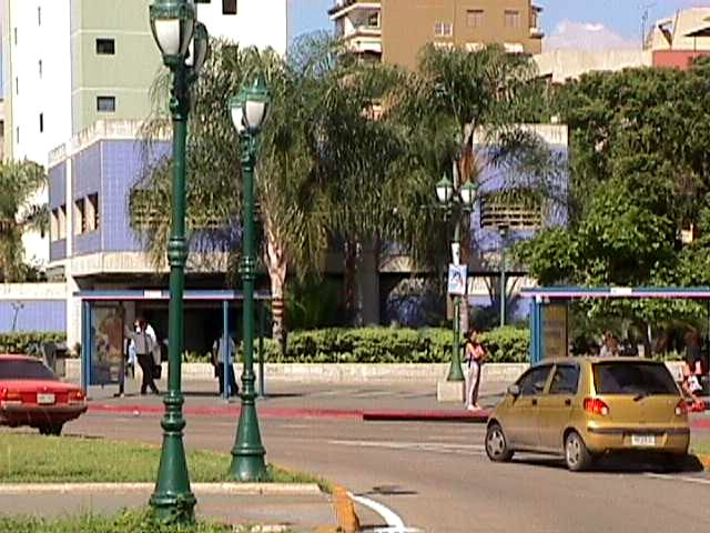 Metro de Caracas - Linea 3 Estacion Los Simbolos en municipio Libertador, Distrito Capital - Venezuela (2000).